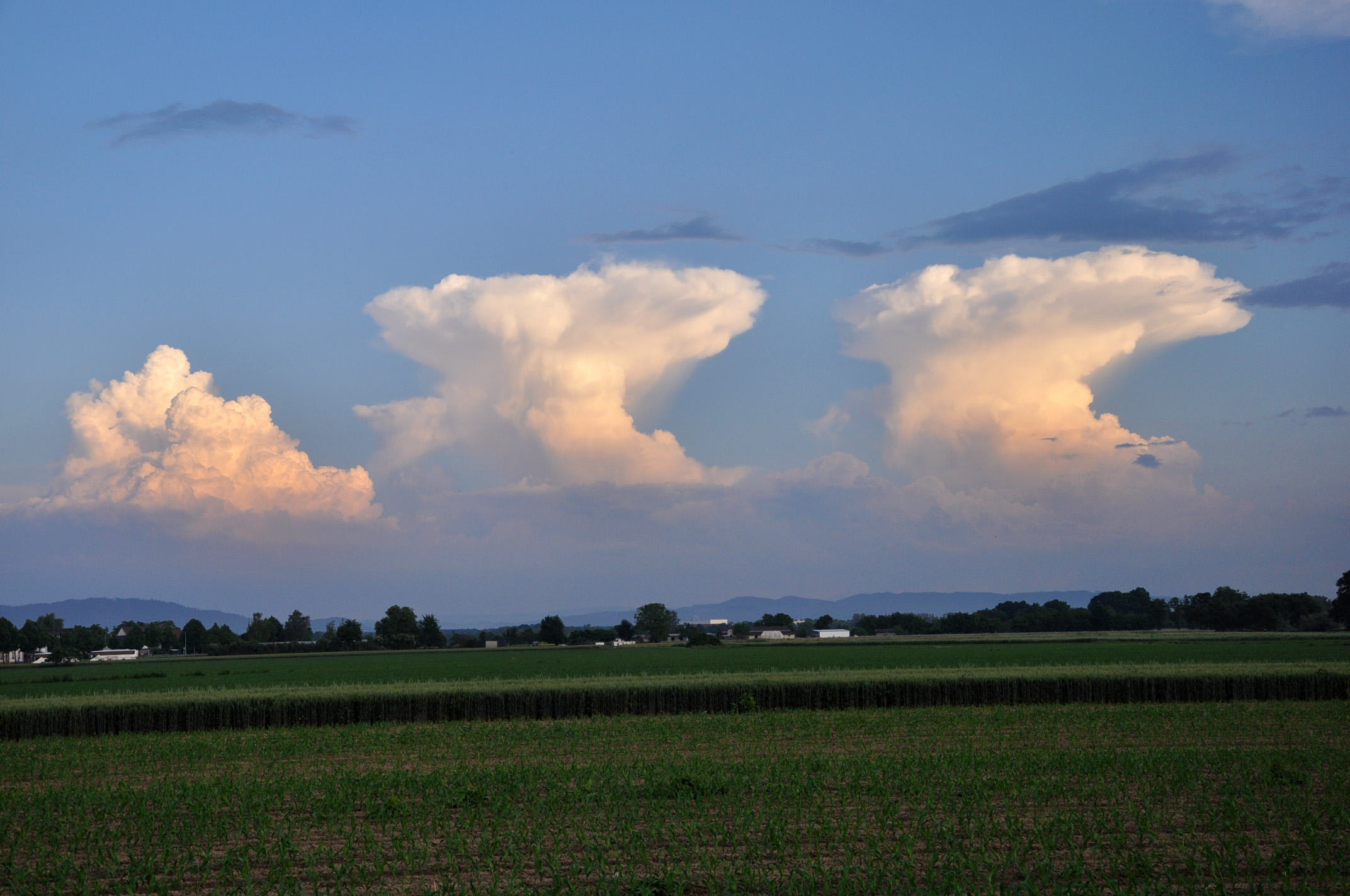 Eine Multizellen-Gewitterformation baut sich über dem Schwarzwald auf. Der Abwind einer Zelle, lässt eine weitere aufsteigen.